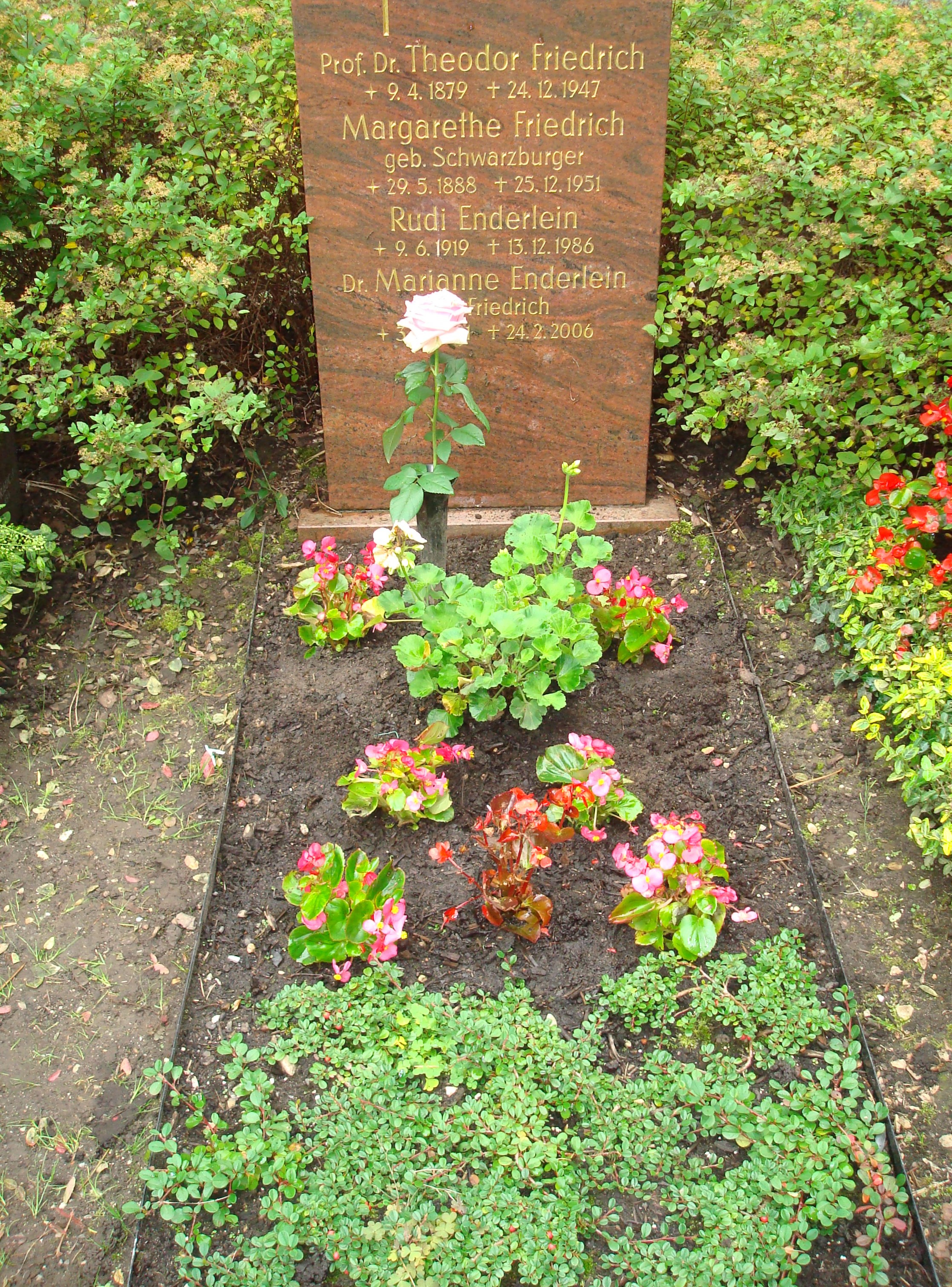 Grabstätte der Familie Theodor Friedrich